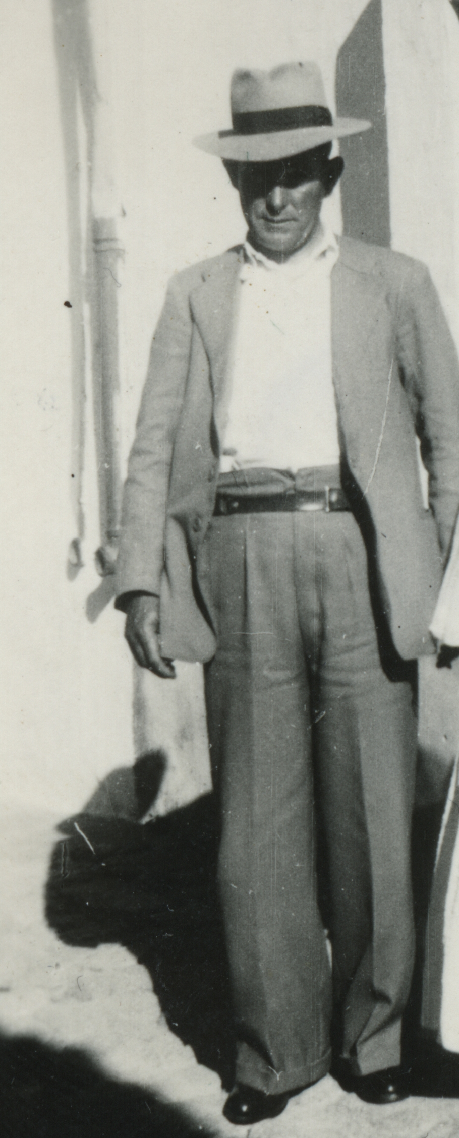 Alcalde de Gargantilla en la década de los 50.